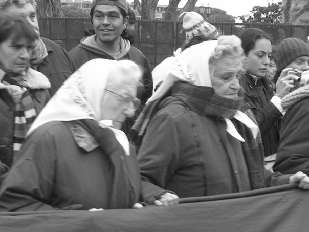 Nais da praza de Maio dos desaparecidos